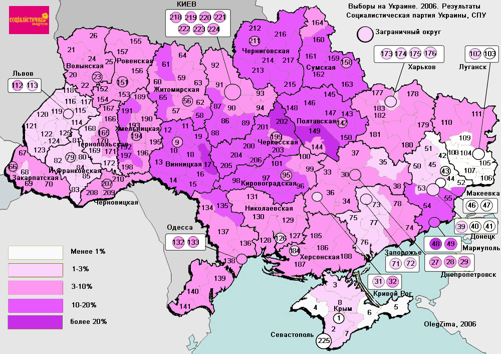 map